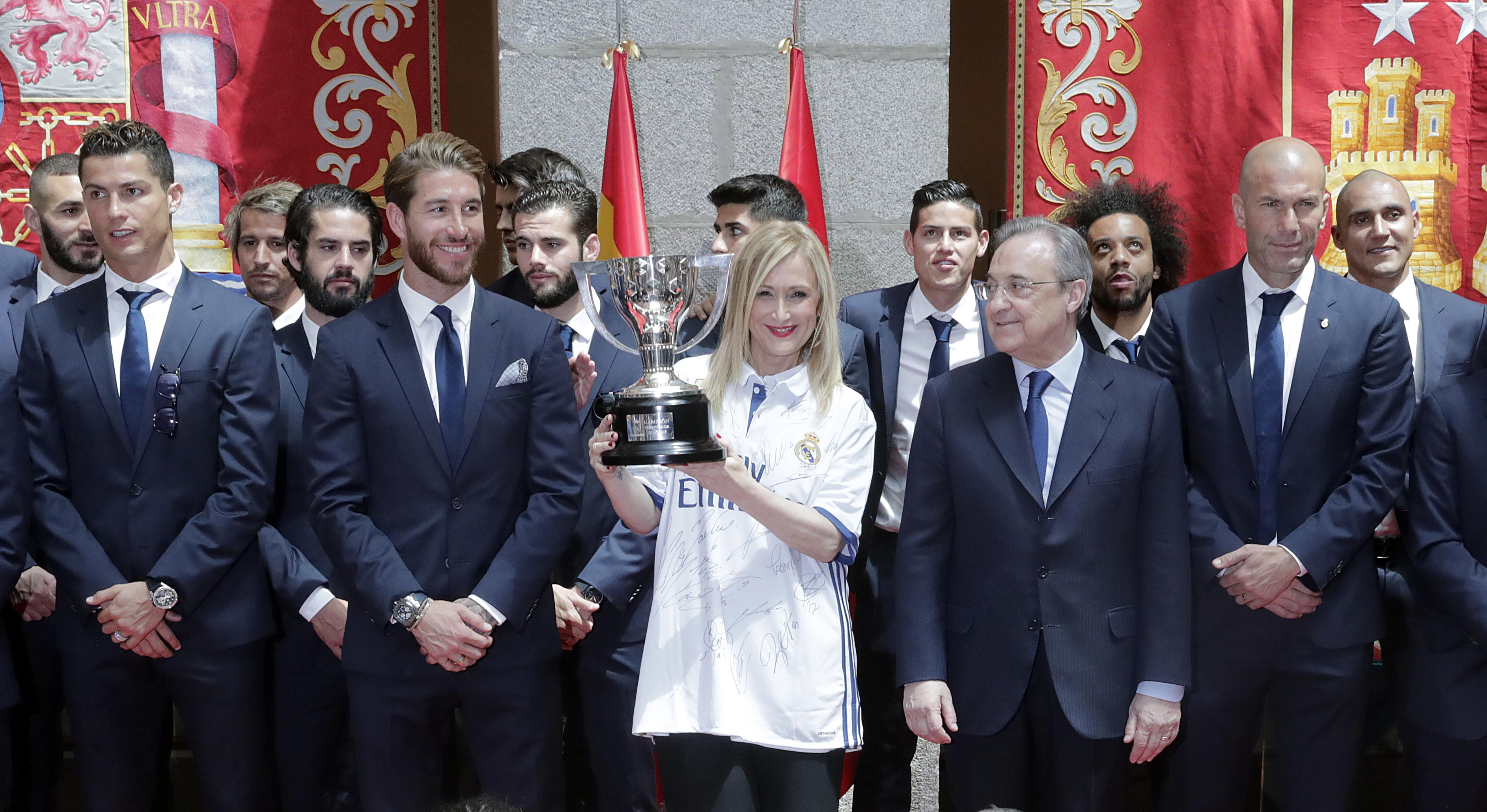 Hoy he recibido, en la Real casa de Correos, a los campeones nuevos campeones del liga, El Real Madrid, un equipo universal que está paseando por todo el mundo el nombre de Madrid y de España. Esta liga es un premio a la constancia, al buen juego, que en definitiva es sinónimo de jugar bien permanentemente, para un equipo que juega con sacrificio, compañerismo, respeto al rival y solidaridad, un equipo reconocido en todo el mundo por sus éxitos y también por los principios deportivos con los que juega. ¡Hala Madrid!